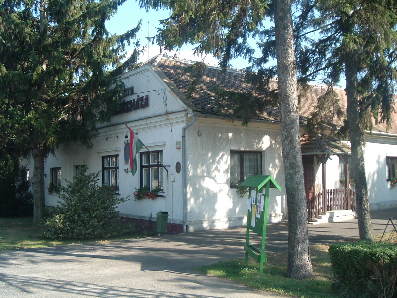 Village Hall in Bük